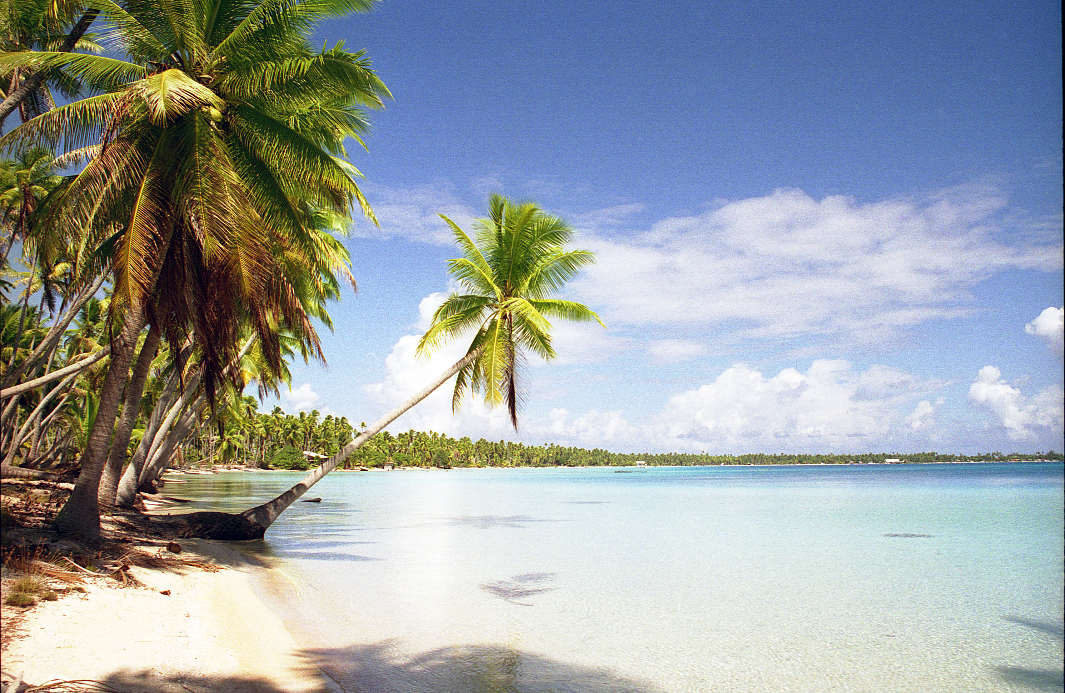 Lagune von Takapoto, Tuamotu, Französisch-Polynesien